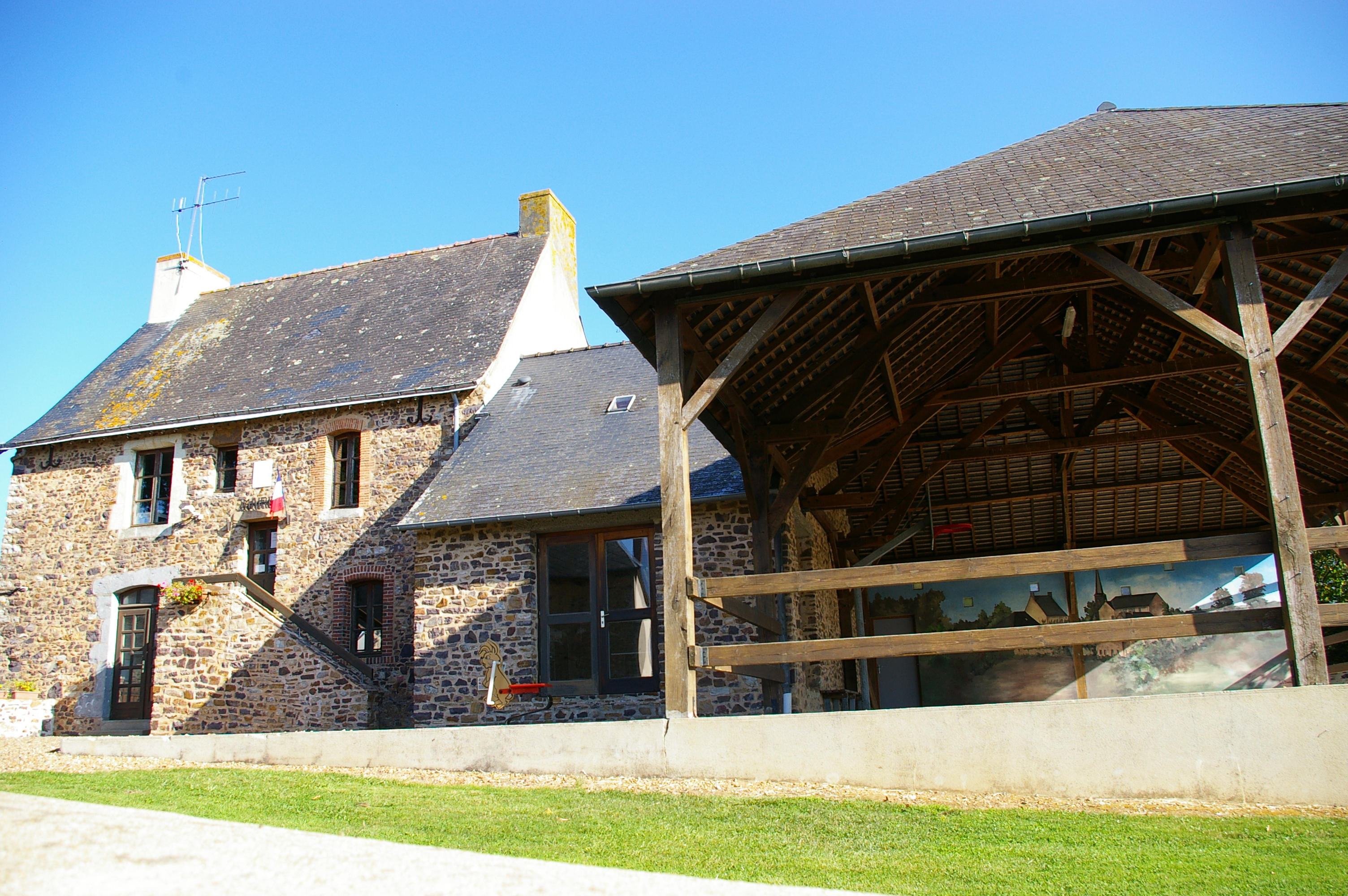 Mairie de Blandouet (Mayenne)